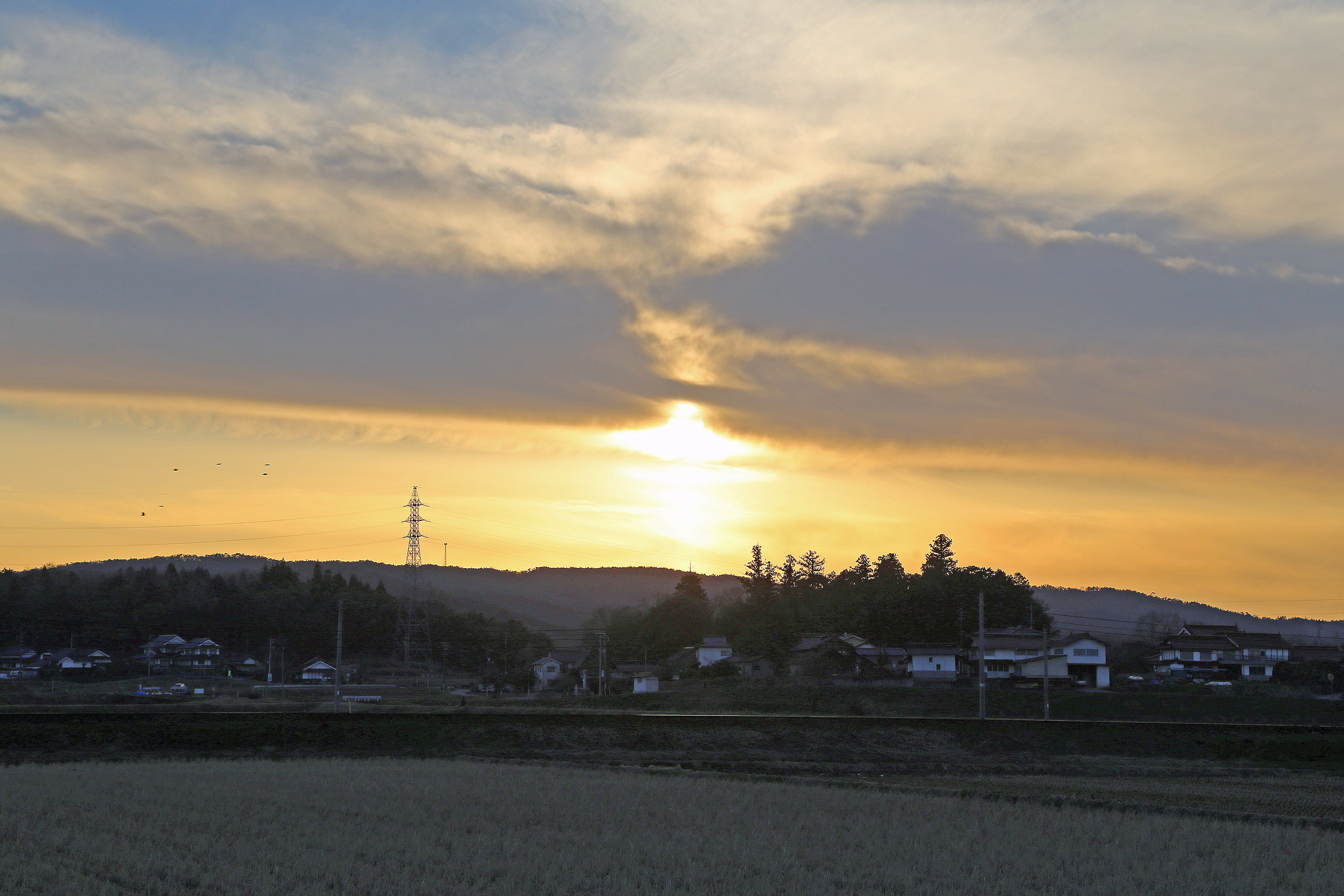 備後国高杉城遠景